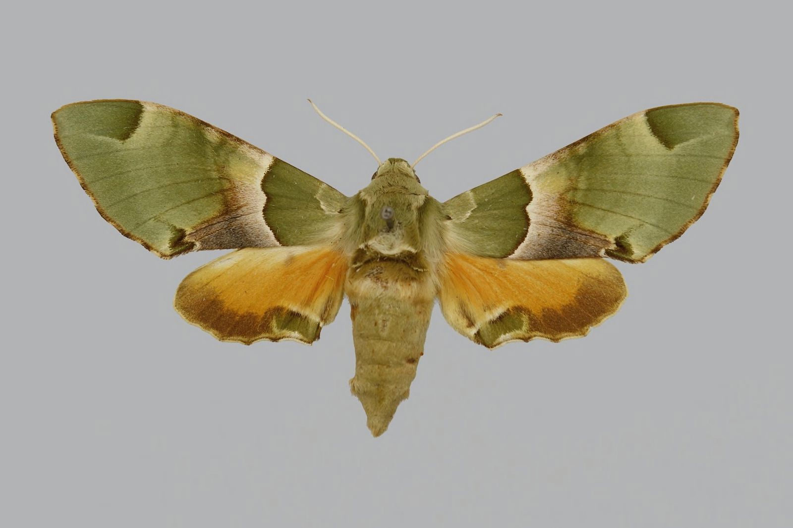 Akbesia davidi davidi, female, upperside. Turkey, Akbes